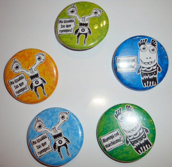 Chapes de la campaña "Na igualdá tas que ruempes"